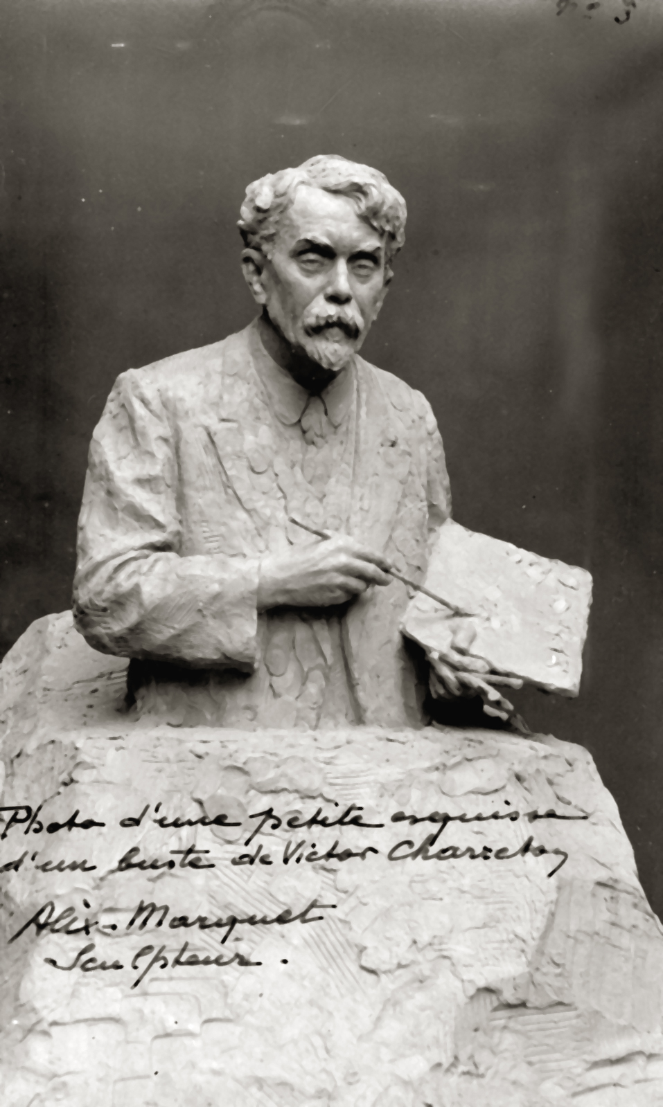 Buste de Victor Charreton par le sculpteur Alix Marquet